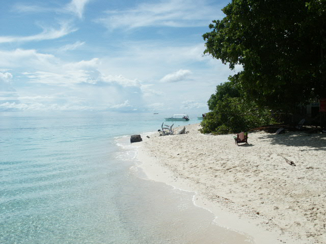 Turtle Patch, Sipadan.